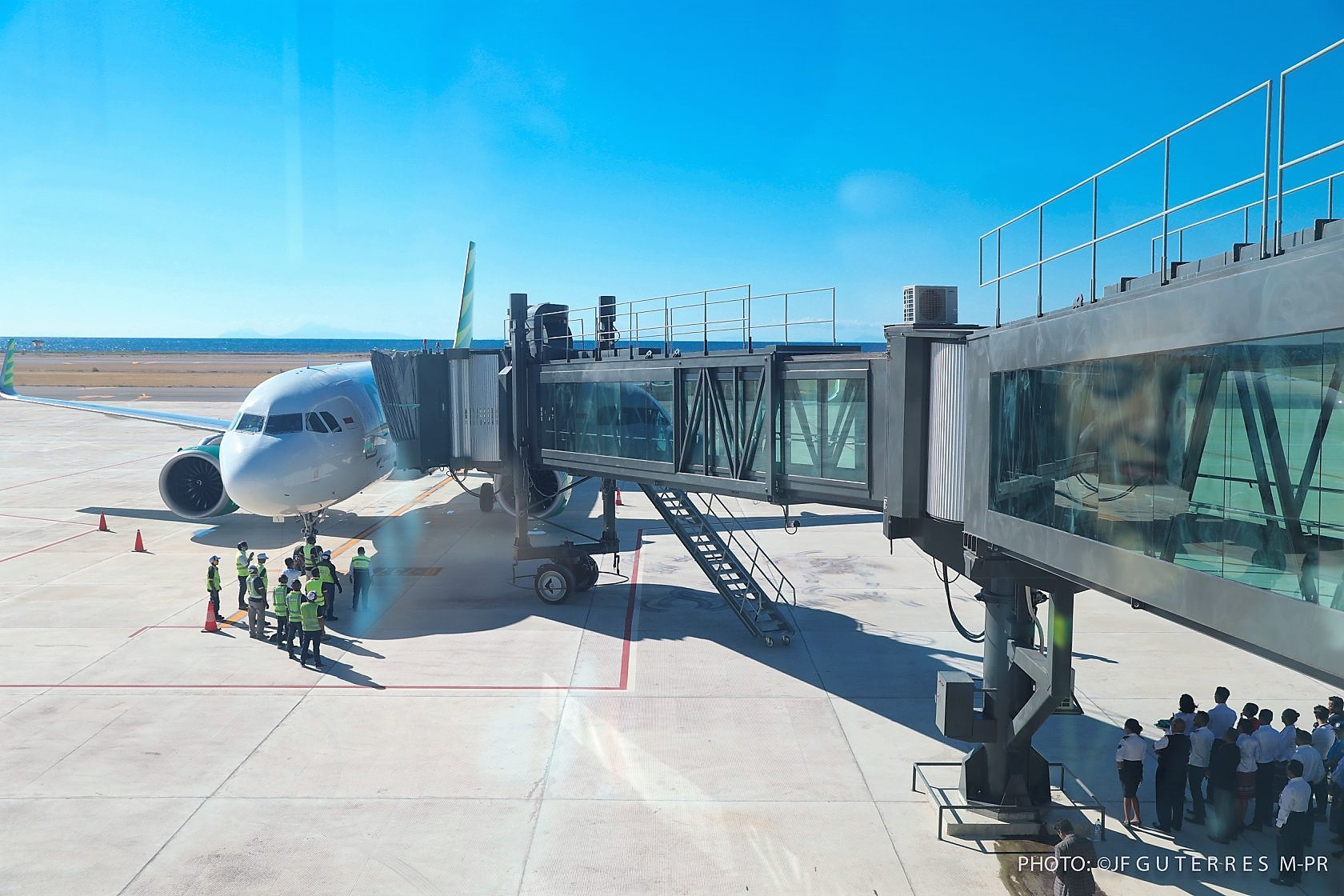 Neueröffnung des Flughafens Oe-Cusse Rota do Sândalo. Ein A320 der Citilink wrd als erste Maschine in der Geschichte Osttimors über eine Fluggastbrücke bedient.